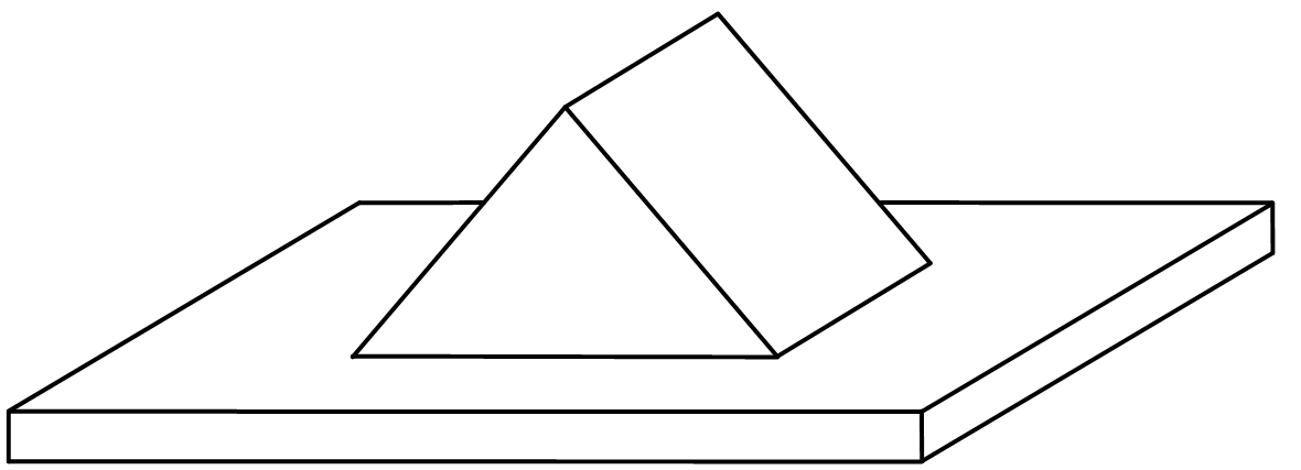 A plane faces solid that is not a polyhedron